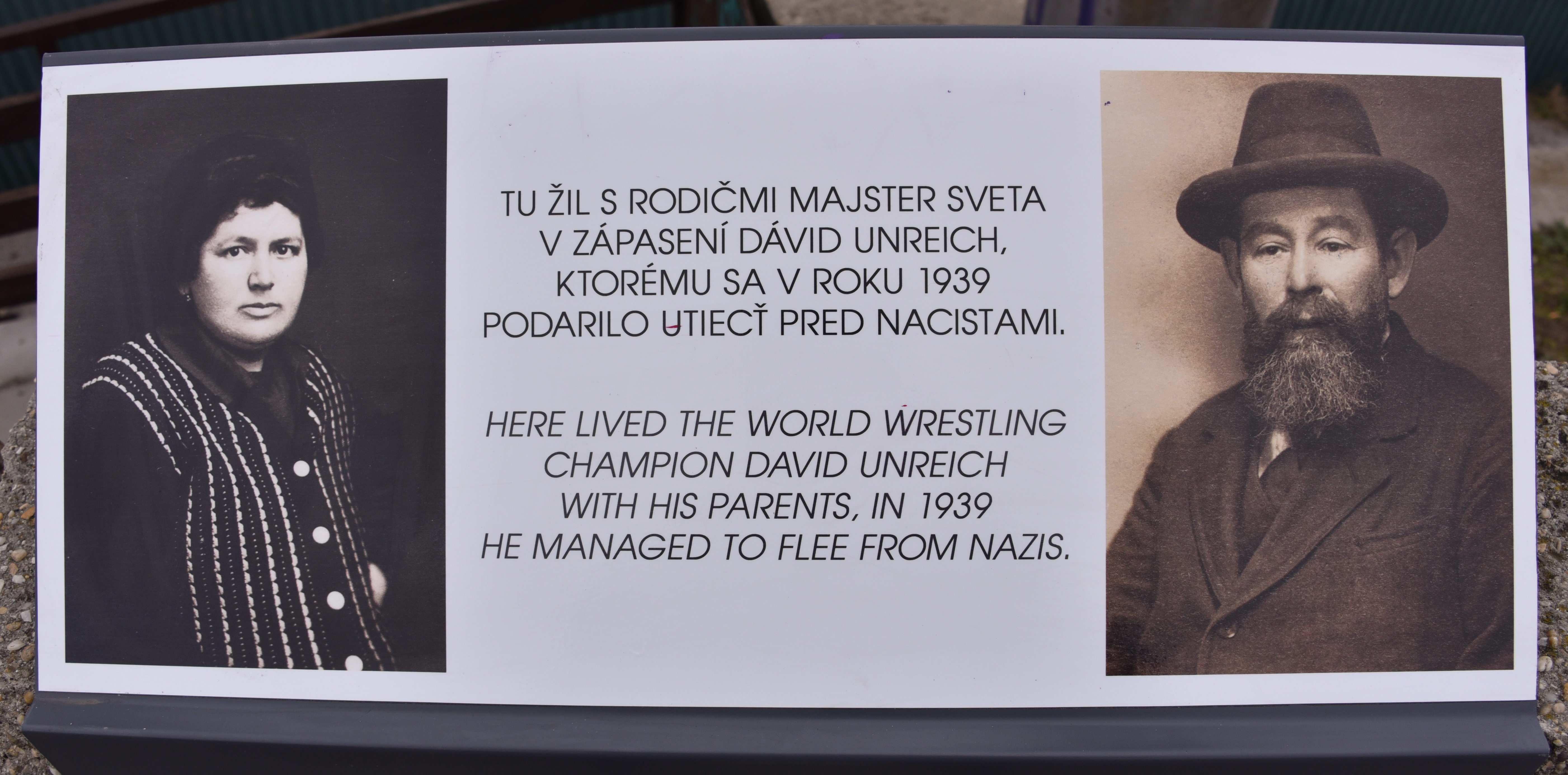 Gedenktafel für Familie Unreich 2